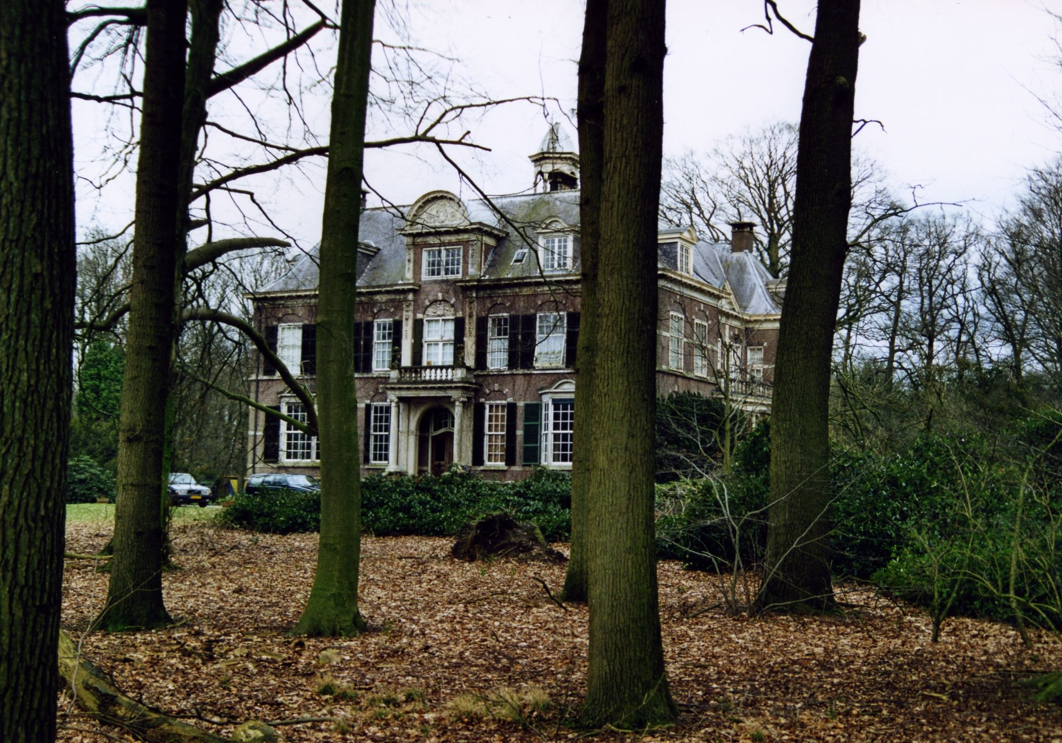 Huis 't Relaer te Raalte.